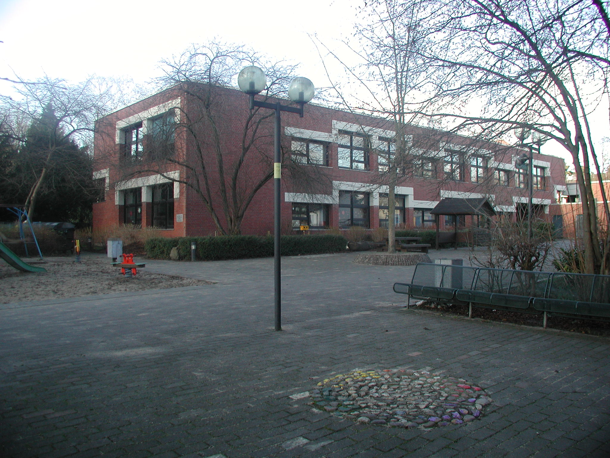 Brühl-Heide, Montessori Schule